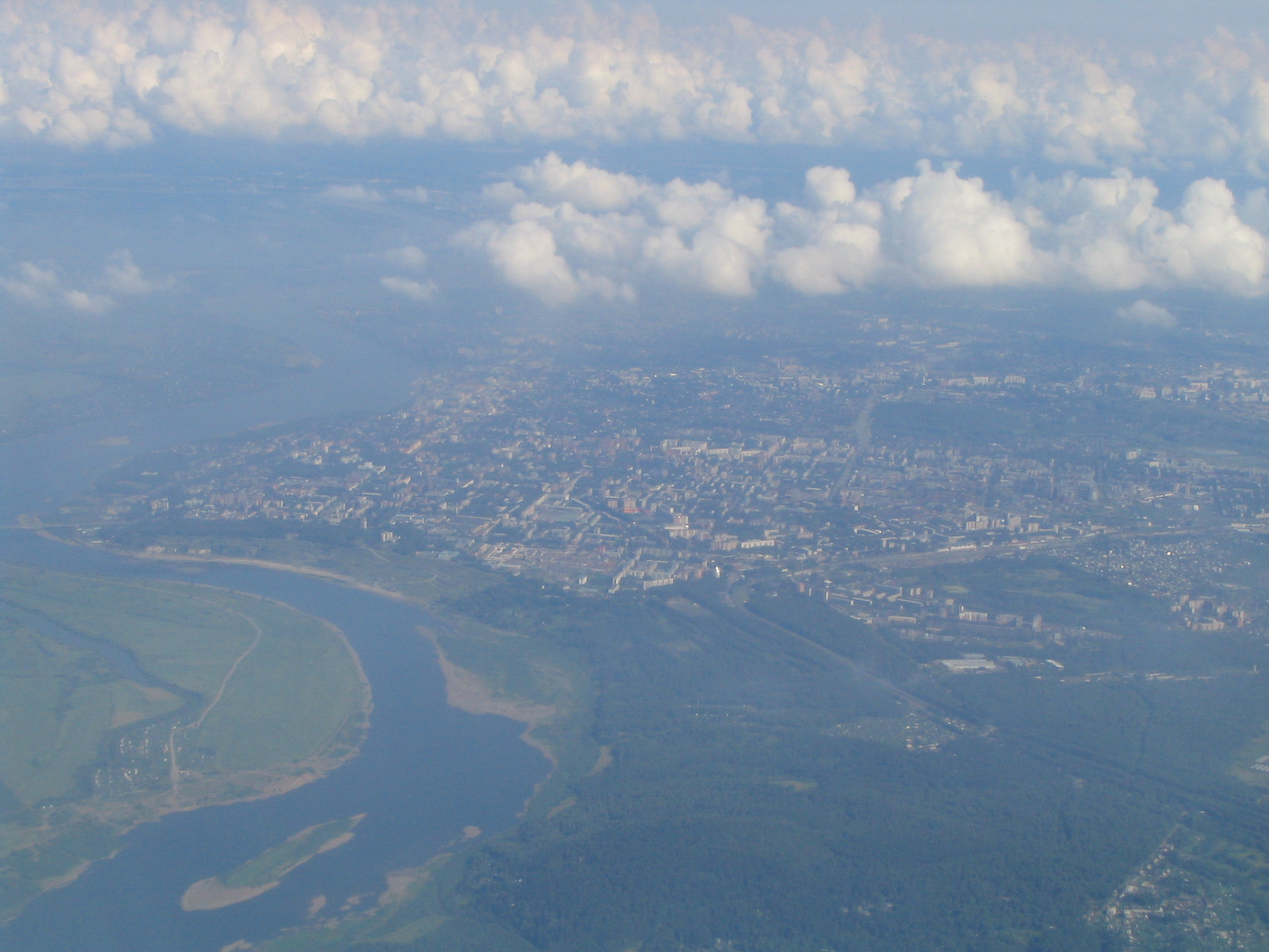 South of Tomsk, Russia, from a jet; RU: Кировский район Томска, вид из иллюминатора самолёта